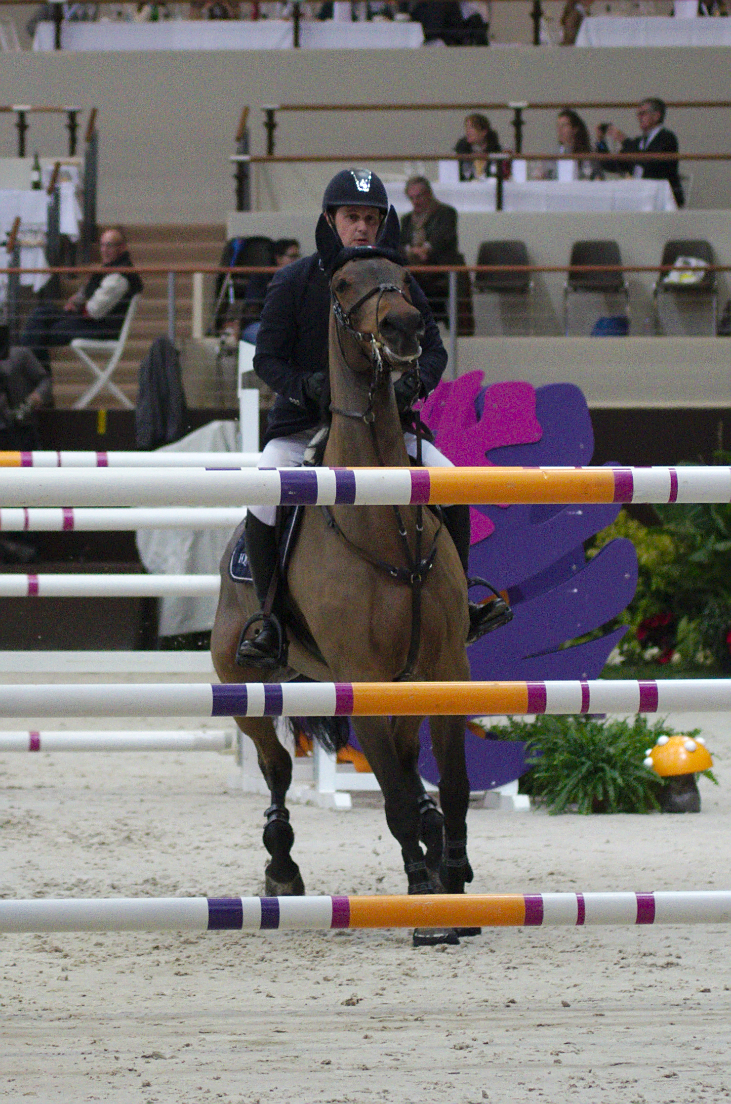 54eme CHI de Genève - 20141213 - Coupe de Genève - Billy Twomey et Diaghilev